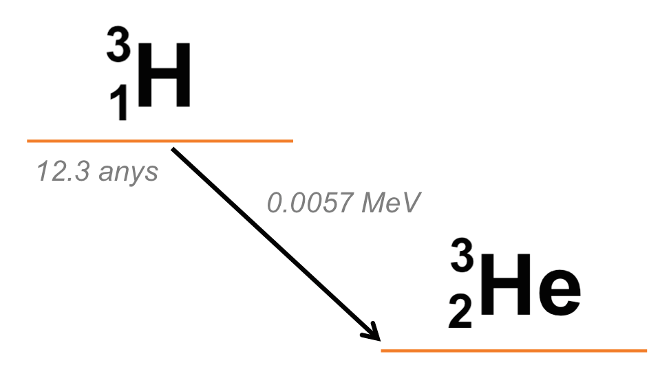 Esquema de desintegració d'hidrogen a heli.